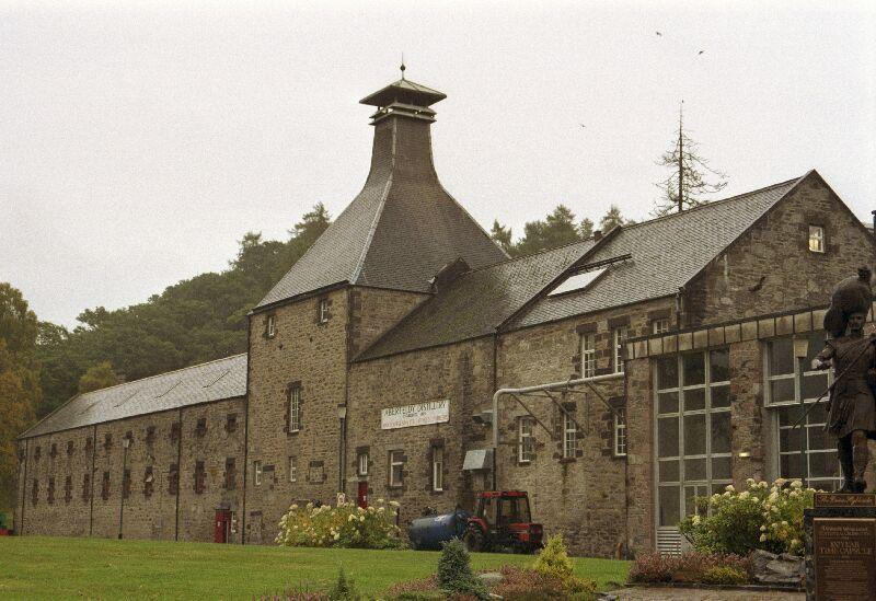 Aberfeldy Malt Whisky Distillery